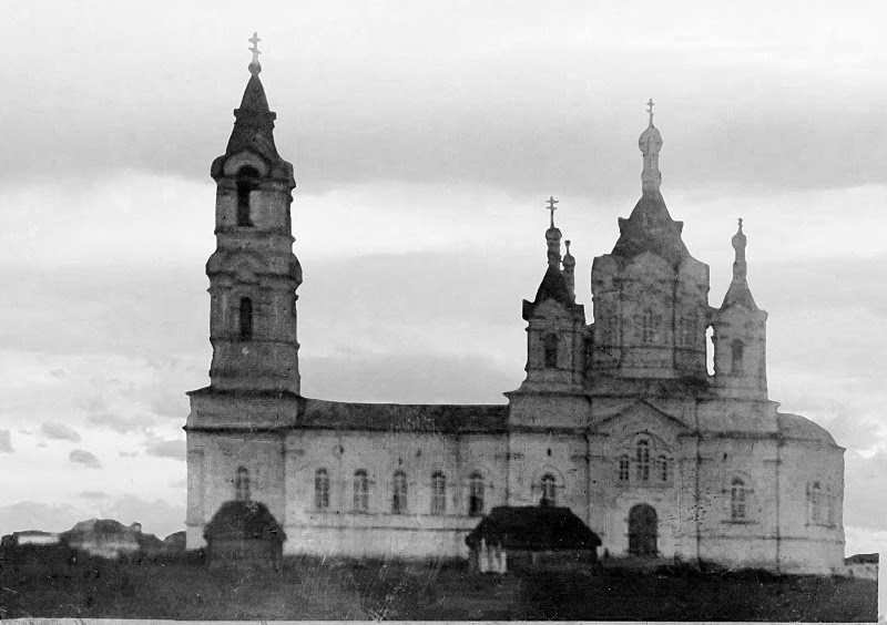 Каменная церковь Архангела Михаила села Шапкино Борисоглебского уезда. Здание церкви открыто для богослужения в 1912 году.